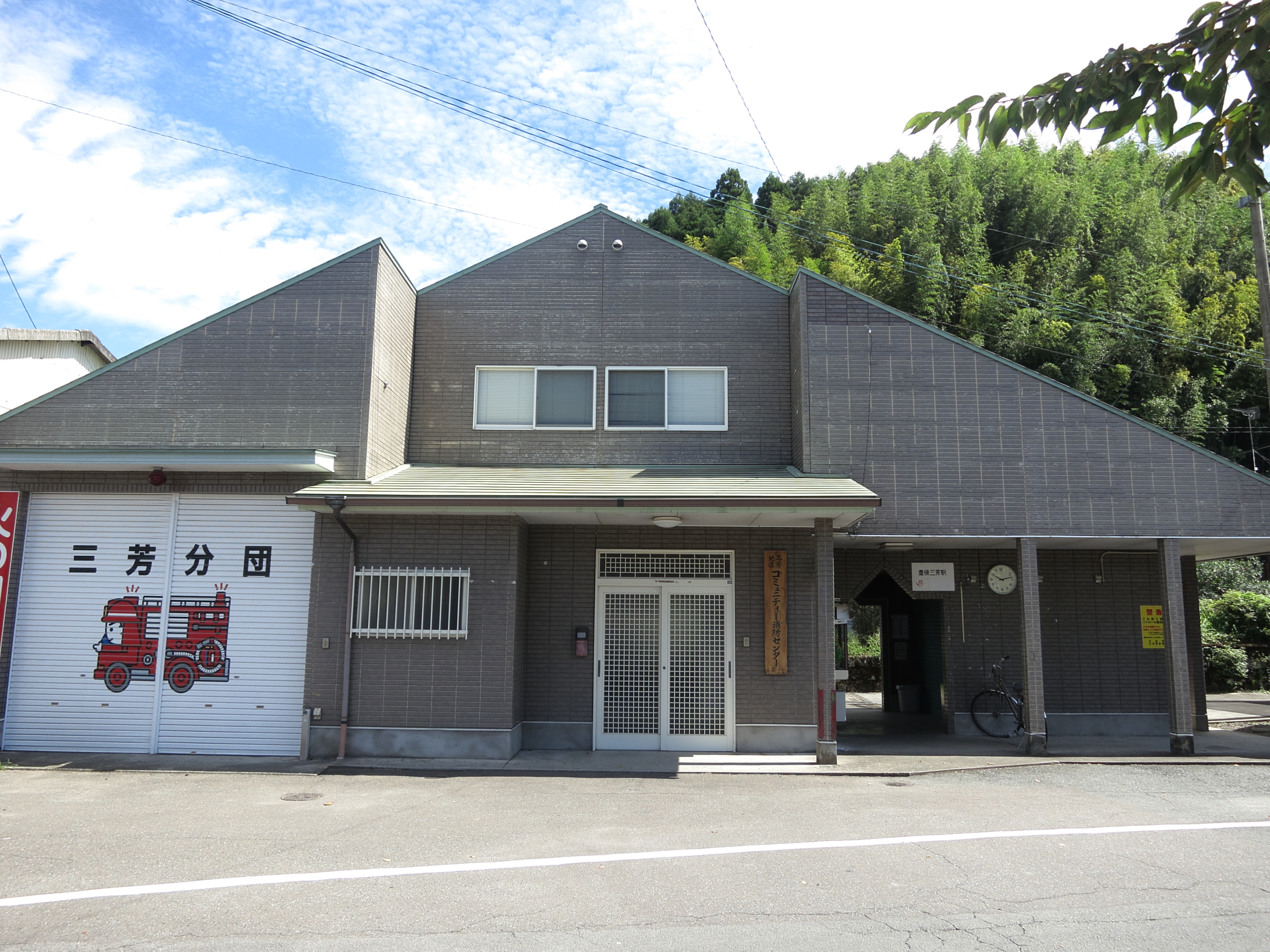 駅舎（平成29年8月31日）